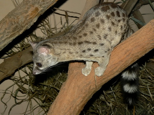 Ложная генета (Genetta thierryi), Пльзенский зоопарк (Zoological and Botanical Garden Plzen), февраль 2011 года